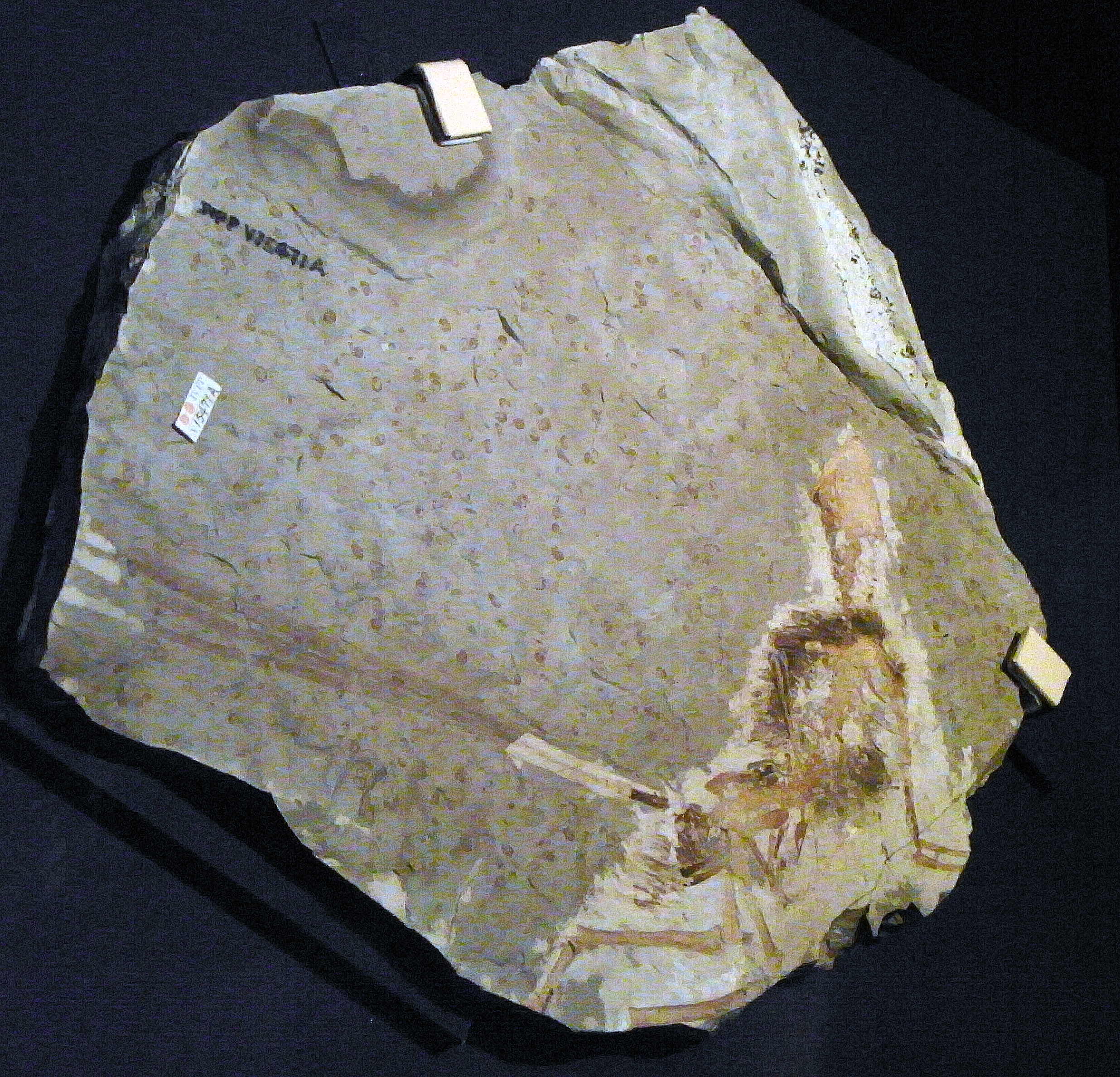 エプデキシプテリクス。 また噛みそうな名前だけど、これもすごい。 この長い尾羽が特徴。